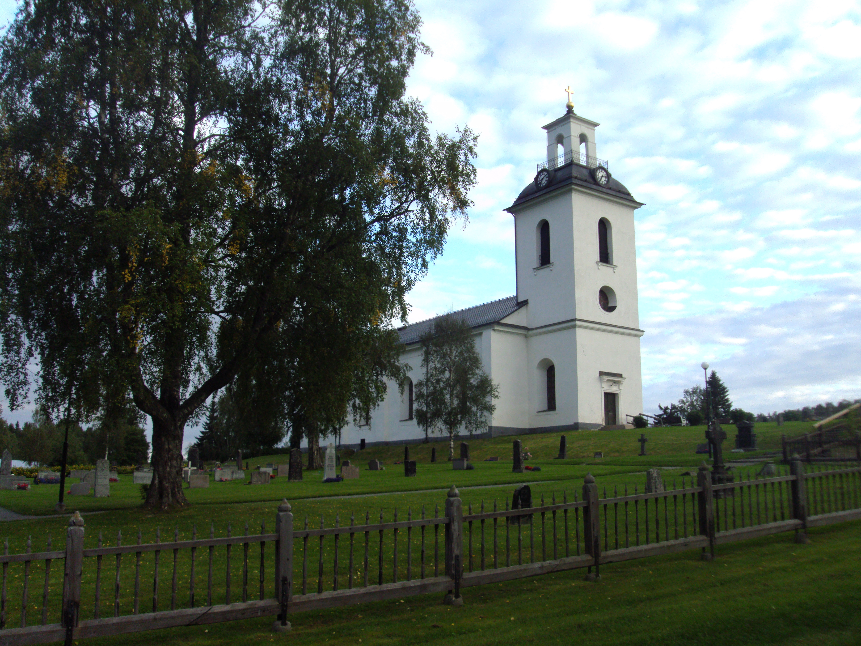 Helgums kyrka